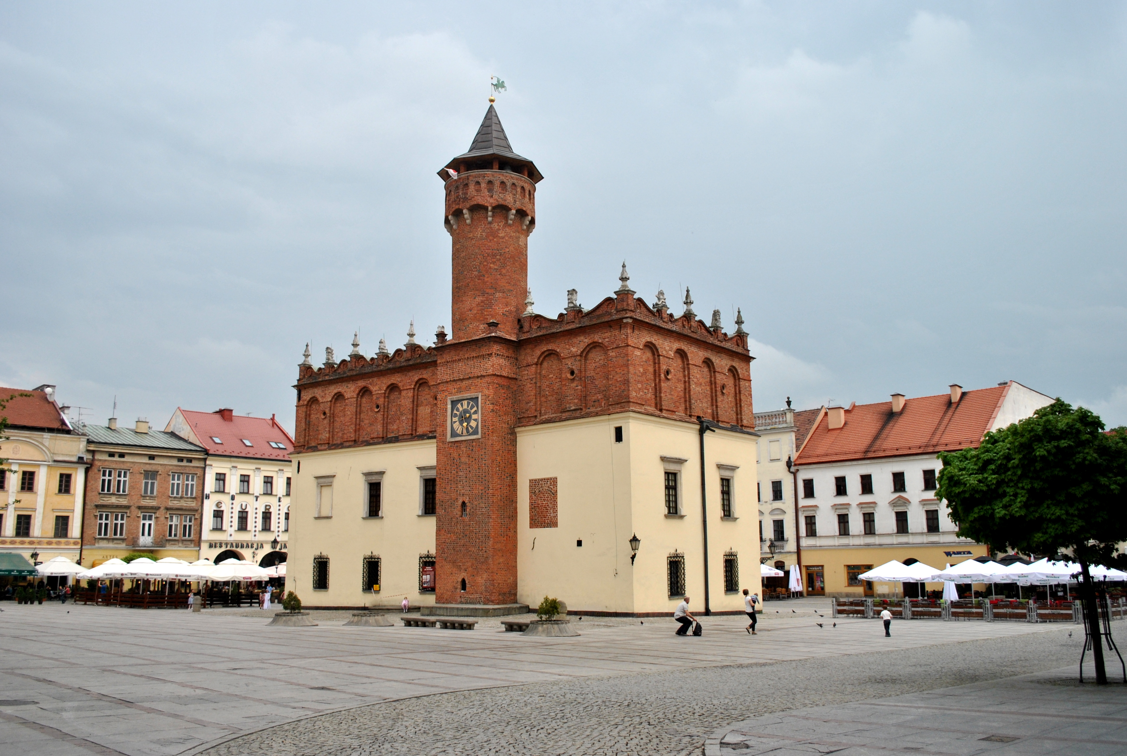 Tarnów, ratusz